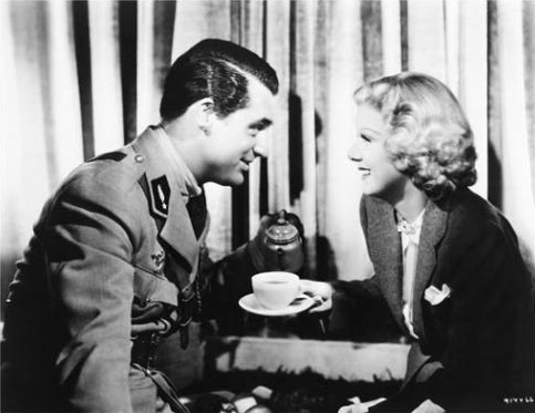 Cary Grant & Jean Harlow taken for film Suzy (1936). See also film still. No copyright notice.